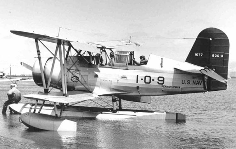 CurtissSOC31O9